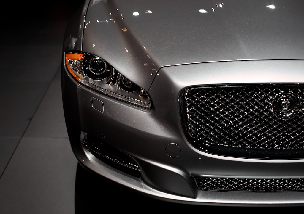 Jaguar XJ